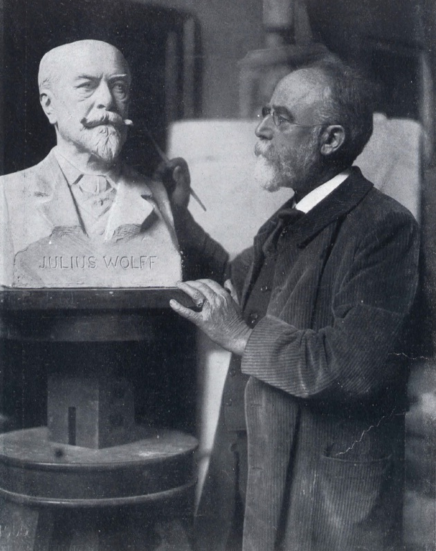 Fritz Schaper, Bildhauer in Berlin, in seiner Werkstatt, 1909.